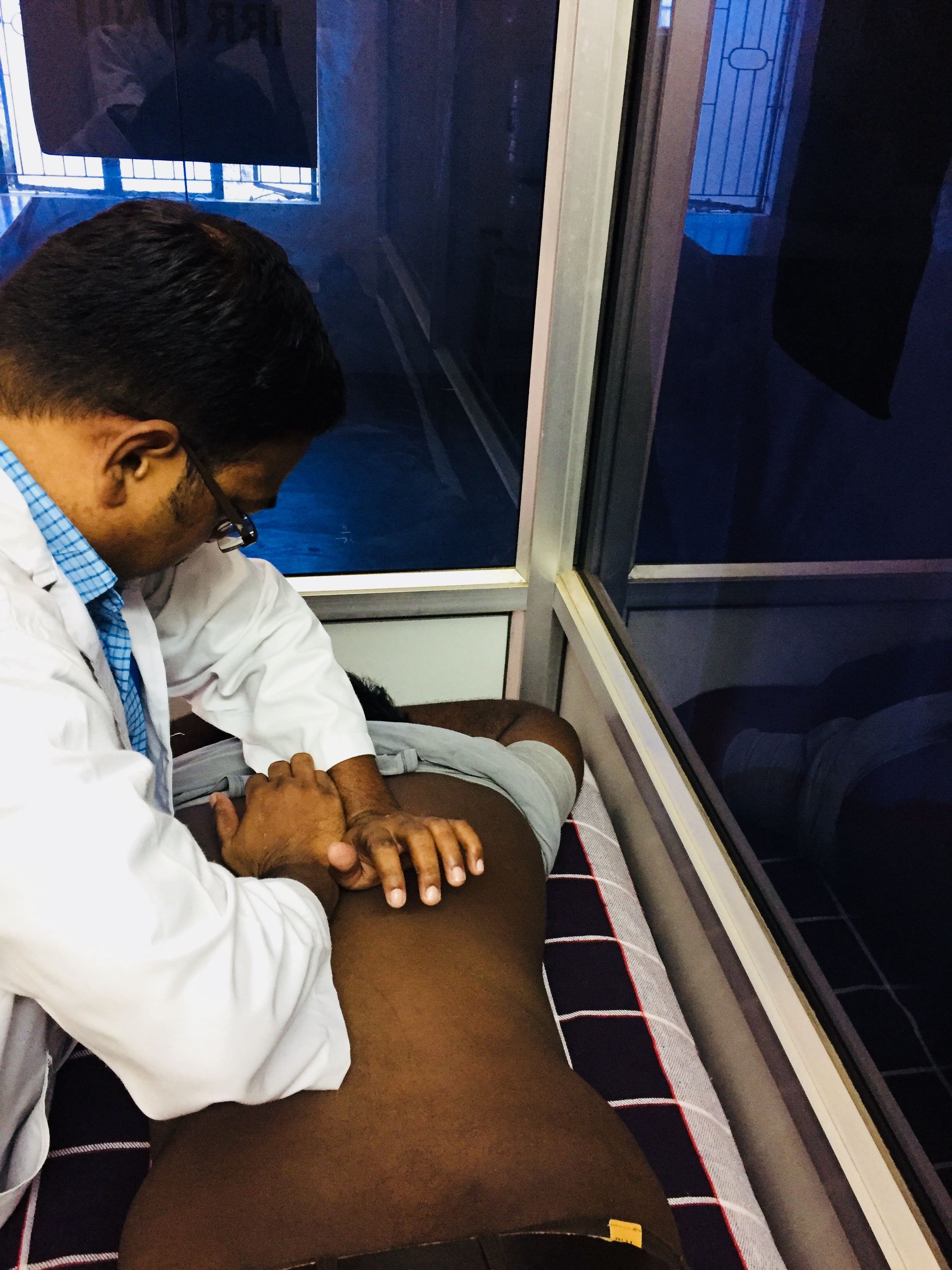 manipulation